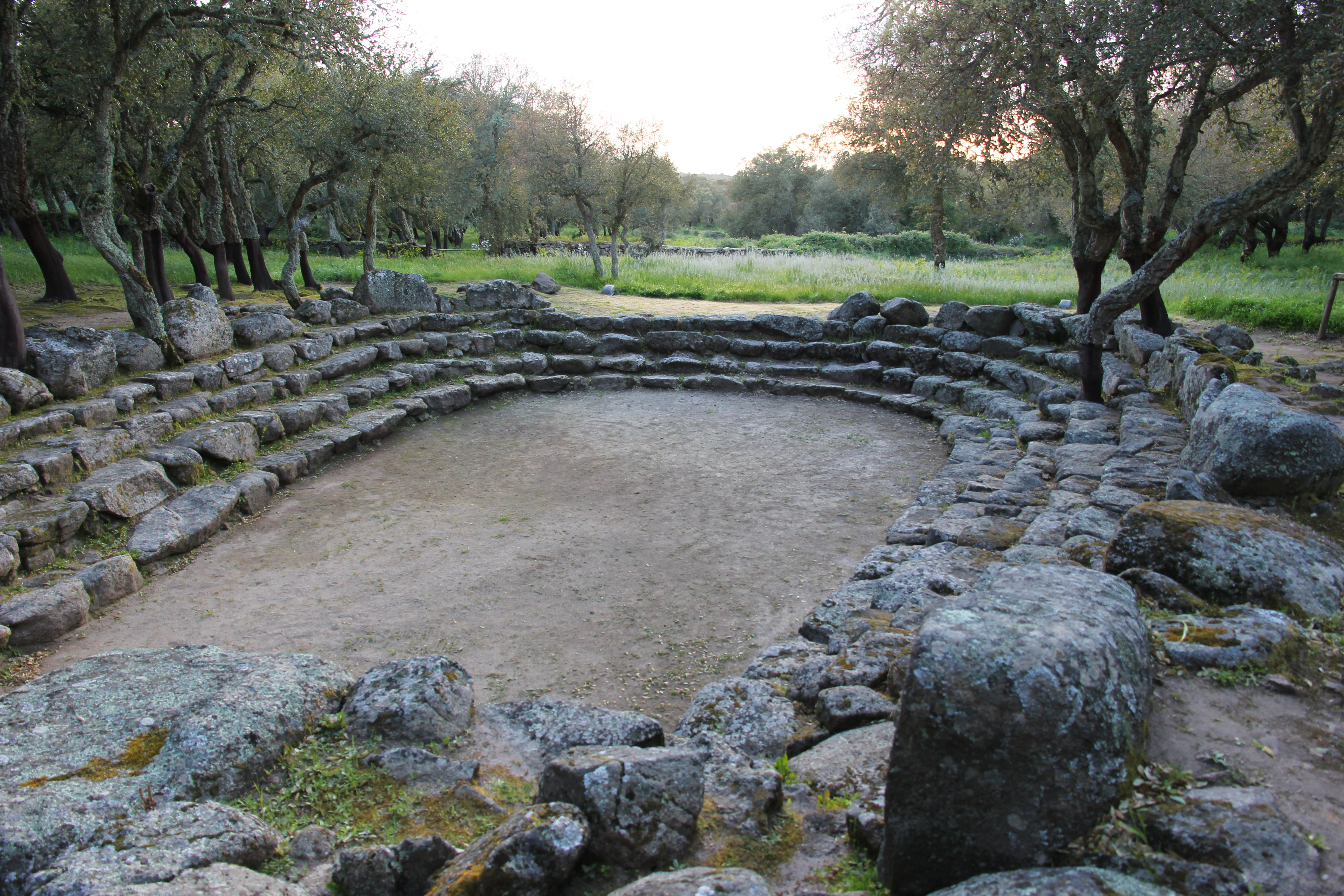 Bitti - Complesso nuragico di Romanzesu